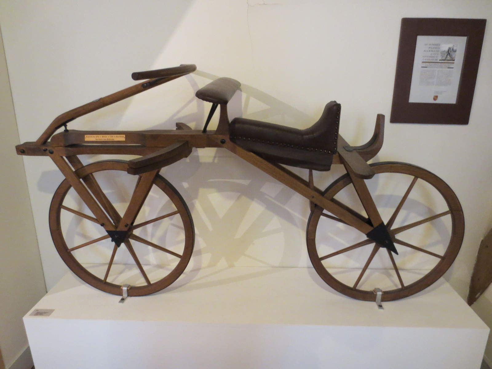 Musée du Septennat de François Mitterrand, réplique de Draisienne ( ancêtre de la bicyclette ), offerte par le maire de Karlsruhe de République Fédérale Allemande